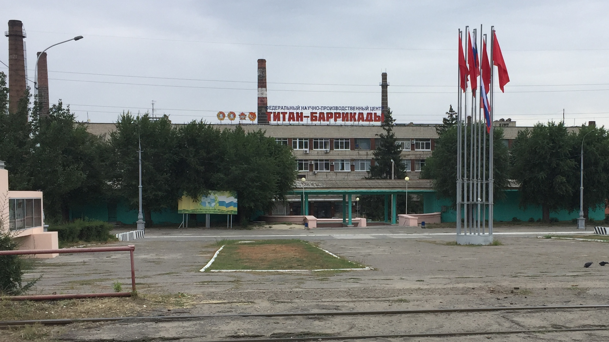 Проходные завода "Титан—Баррикады". Волгоград, проспект Ленина, 114Б.